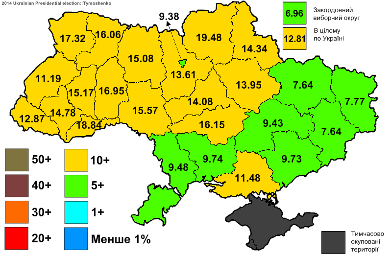 Електоральна підтримка Тимошенко Юлії Володимирівни на виборах Президента України 2014.